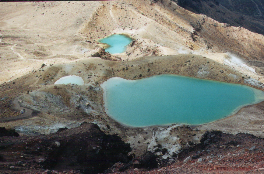 Die Emerald Lakes im Tongariro National Park